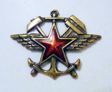 Эмблема железнодорожных войск и службы ВОСО в СССР, СНГ и РФ в 1936—1994 гг. (до 1943 г. носилась на петлицах, затем на погонах, после 1955 г. снова петличная)